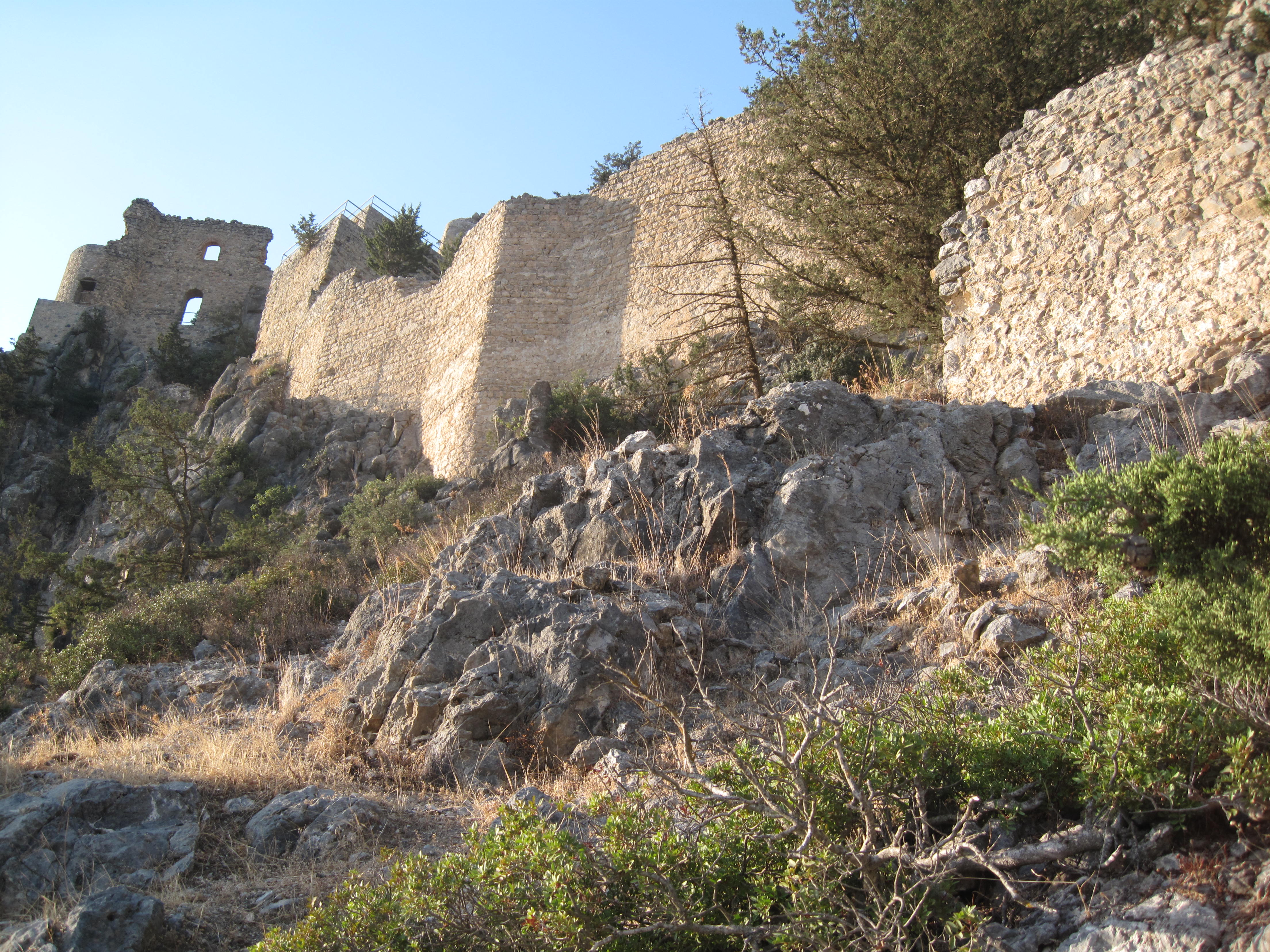 Voufavento kasteel